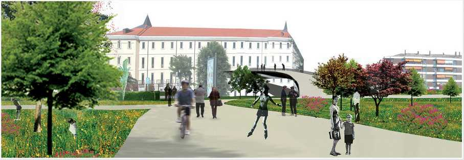 Vista de la Universidad Carlos III de Leganés desde el barrio de San Nicasio, en una ficción que refleja la reurbanización propuesta por el Ayuntamiento de Leganés. Fuente: Larcovi.